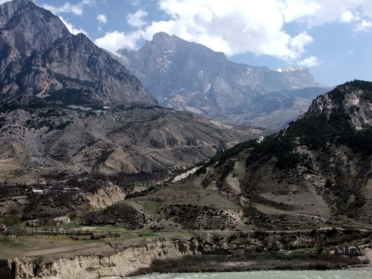 Printempo en la montaro de Alagira distrikto de Nord-Osetio (suda Rusio).